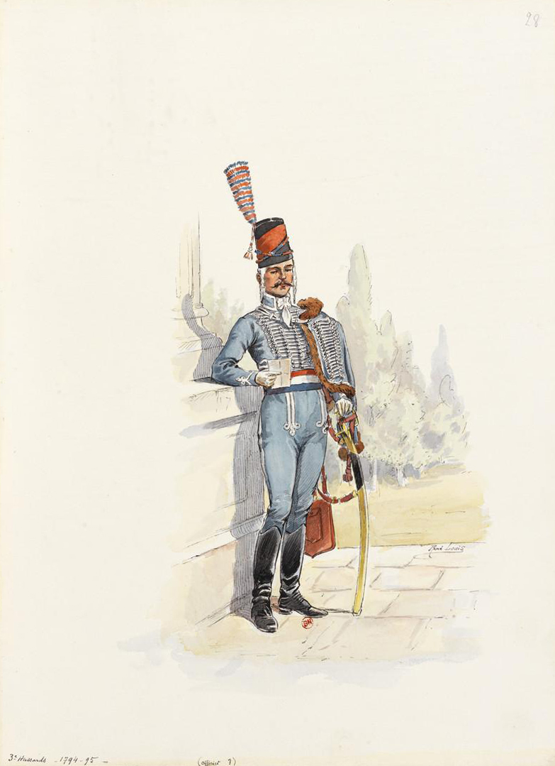 Officier du 3e Hussards (1794-1795)